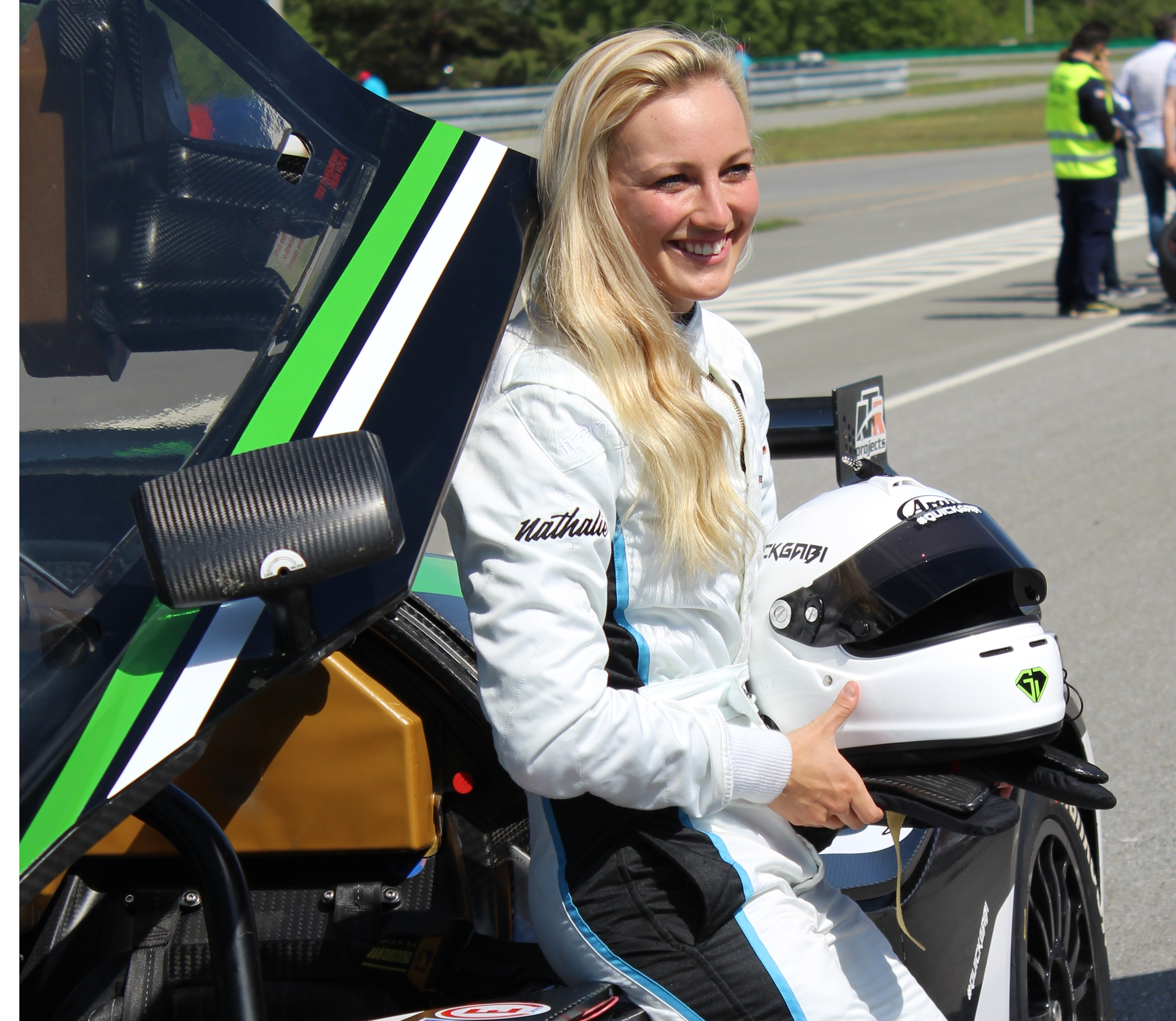 Gabriela před startem závodu